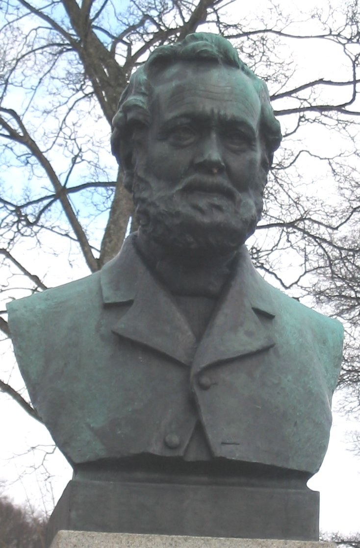 Ole Nielsen, founder of Aalgaards Uldvarefabrikker 1870, statue at Storahuset, Ålgård, Rogaland, Norway Author: Rune Sattler (User:Shauni)